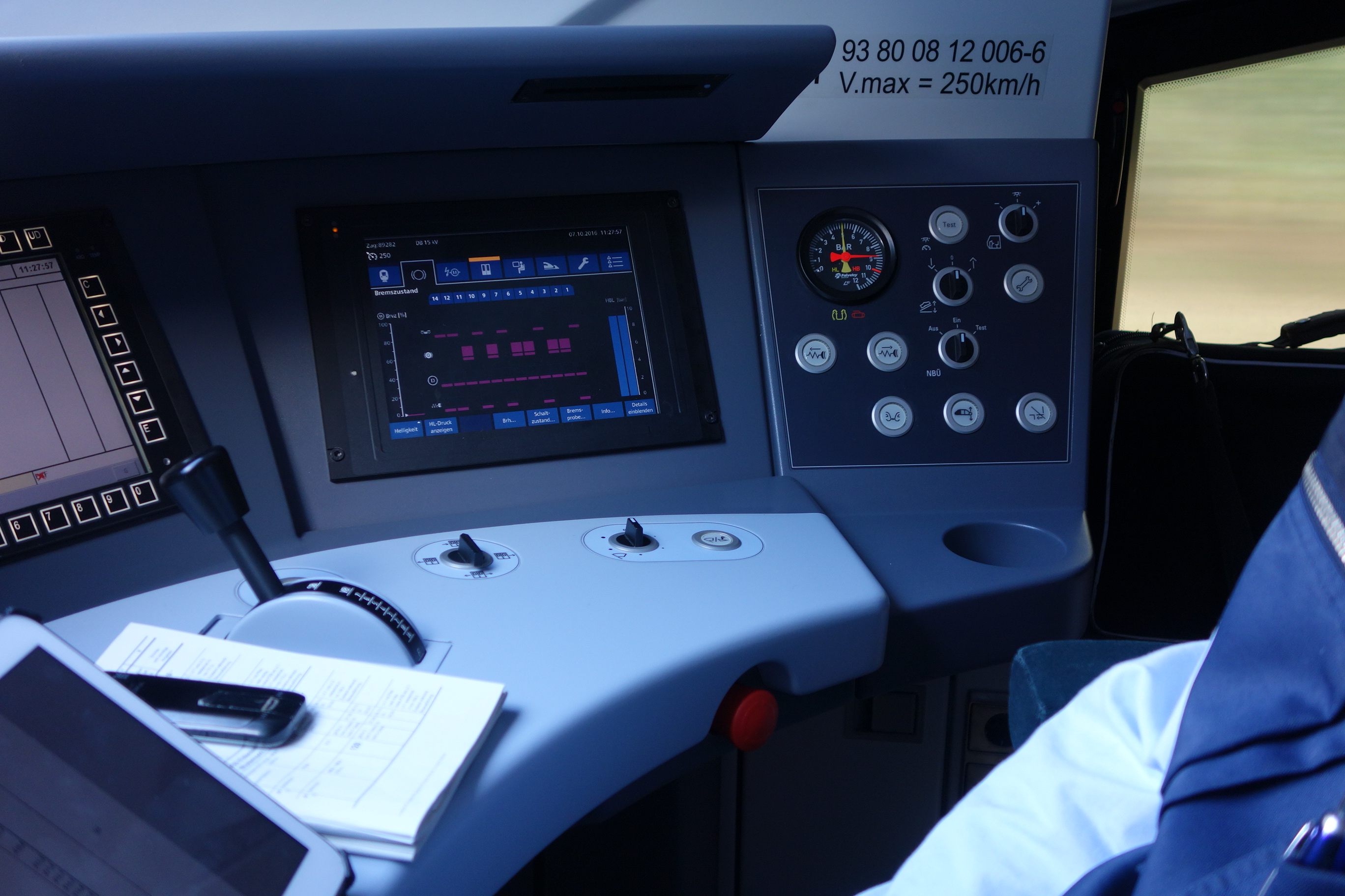 ICE 4 der Deutschen Bahn (Baureihe 412), Führerstand